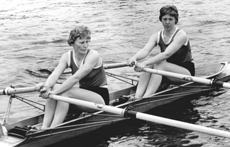 Helga Richter, Hannelore Göttlich Zentralbild Dressel Non-Ku 29.5.1960 Grünauer Frühjahrsregatta der Ruderer am 29.Mai 1960 Im Senioren-Doppelzweier (ohne) siegten Hannelore Göttlich (rechts) und Helga Richter von Chemie Pirna.